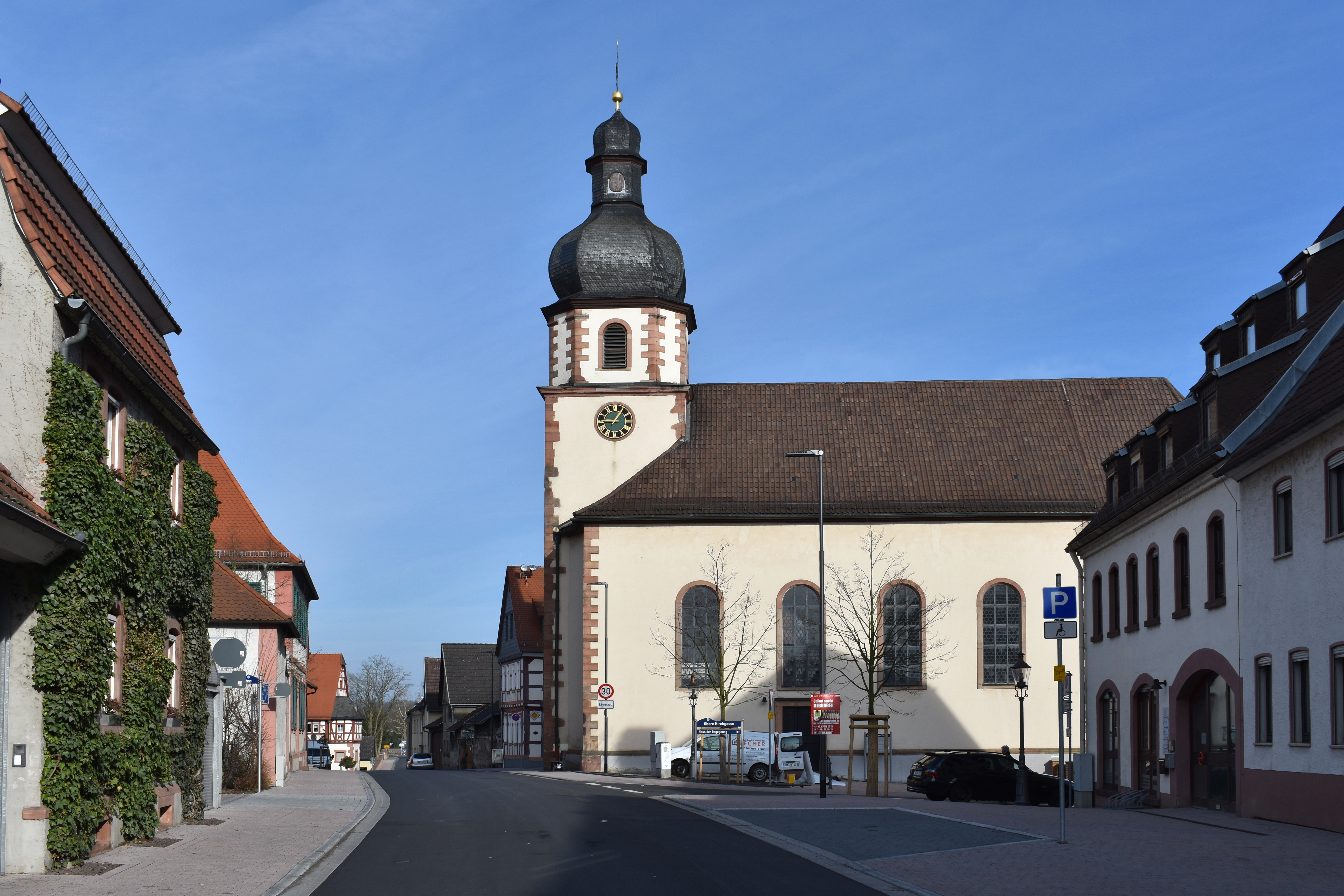 Stockstadt am Main, Blick in der Hauptstraße nach Norden auf die kath. Kirche St. Leonhard.